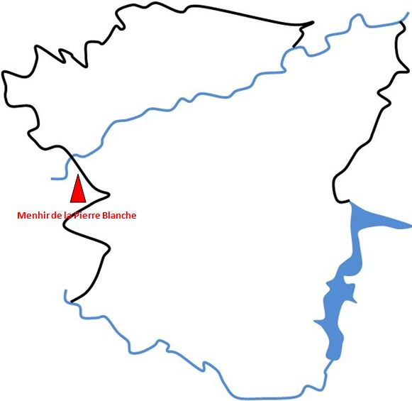 Vitré au Néolithique